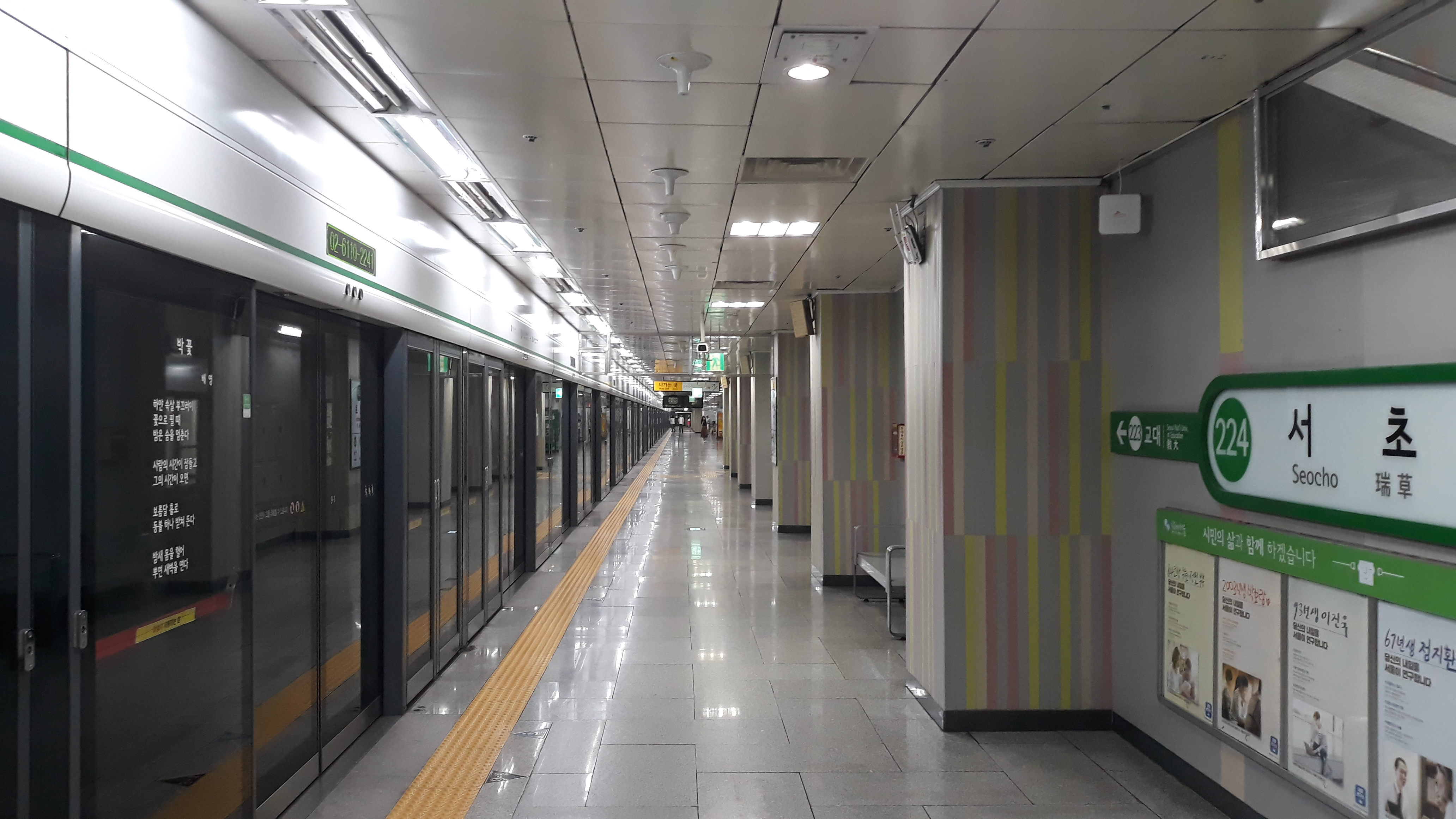 瑞草駅の最近写真です。